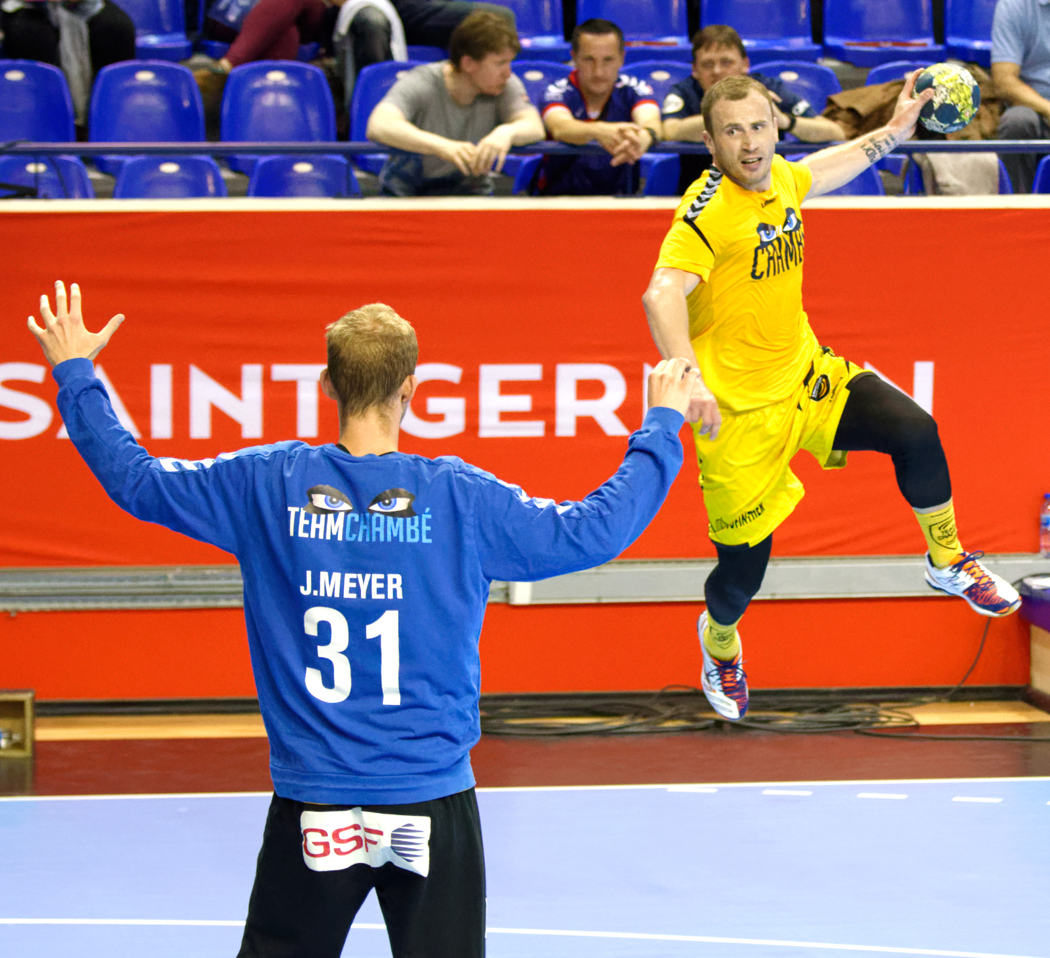 Match de la dernière journée du championnat 2017-18. PSG contre Chambéry. A Coubertin, le 31 mai 2018.